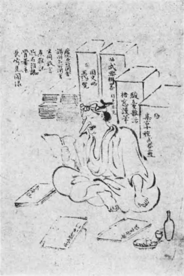 漫画風に写された佐藤正持自画像 峯山町毛呂清春氏蔵